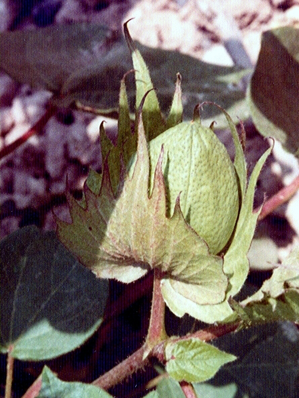 Gossypium herbaceum (algodón): Fruto (cápsula) inmaduro in situ, con las piezas del epicáliz persistentes - Cultivado, El Salitre, Albatera (Alicante, España).